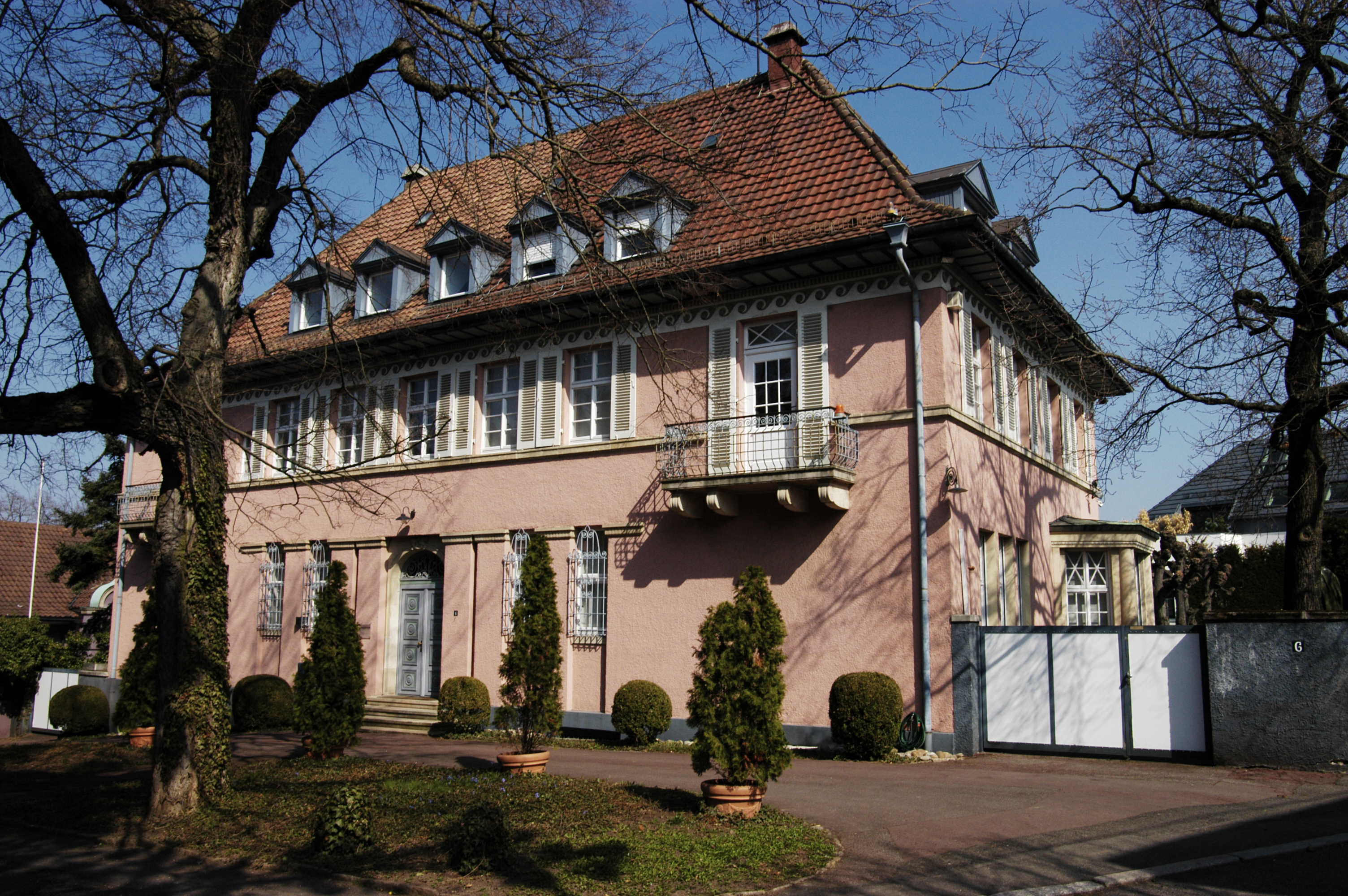 Valentien Gallery Gellertstraße 6, 70184 Stuttgart